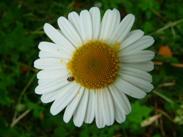 Blüte der Wiesen-Margerite (Leucanthemum vulgare)